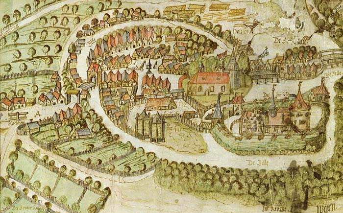 Karte des Kartografen Hans Frese: Bergedorf 1598